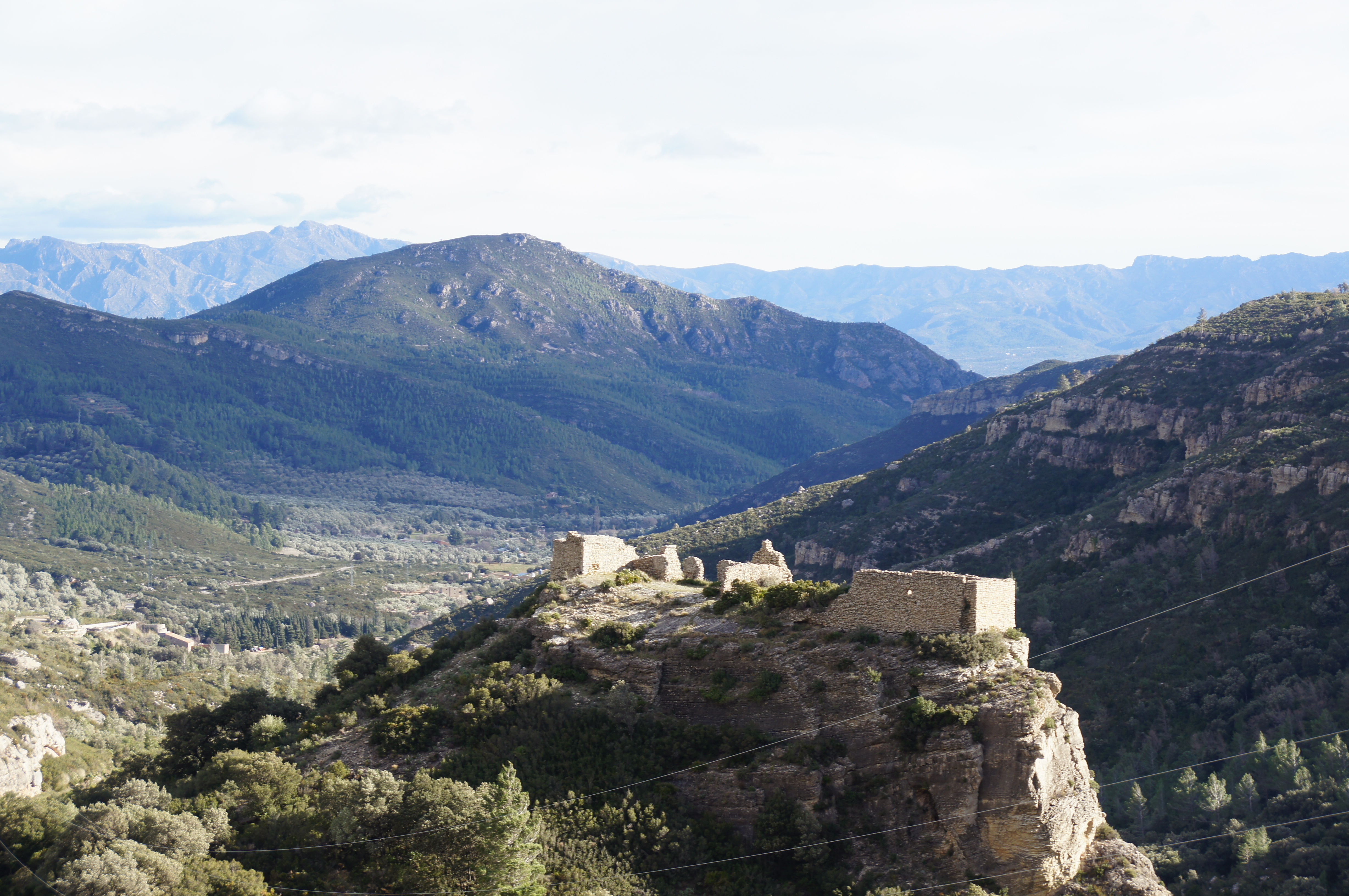 Castell de Carles (Alfara de Carles)